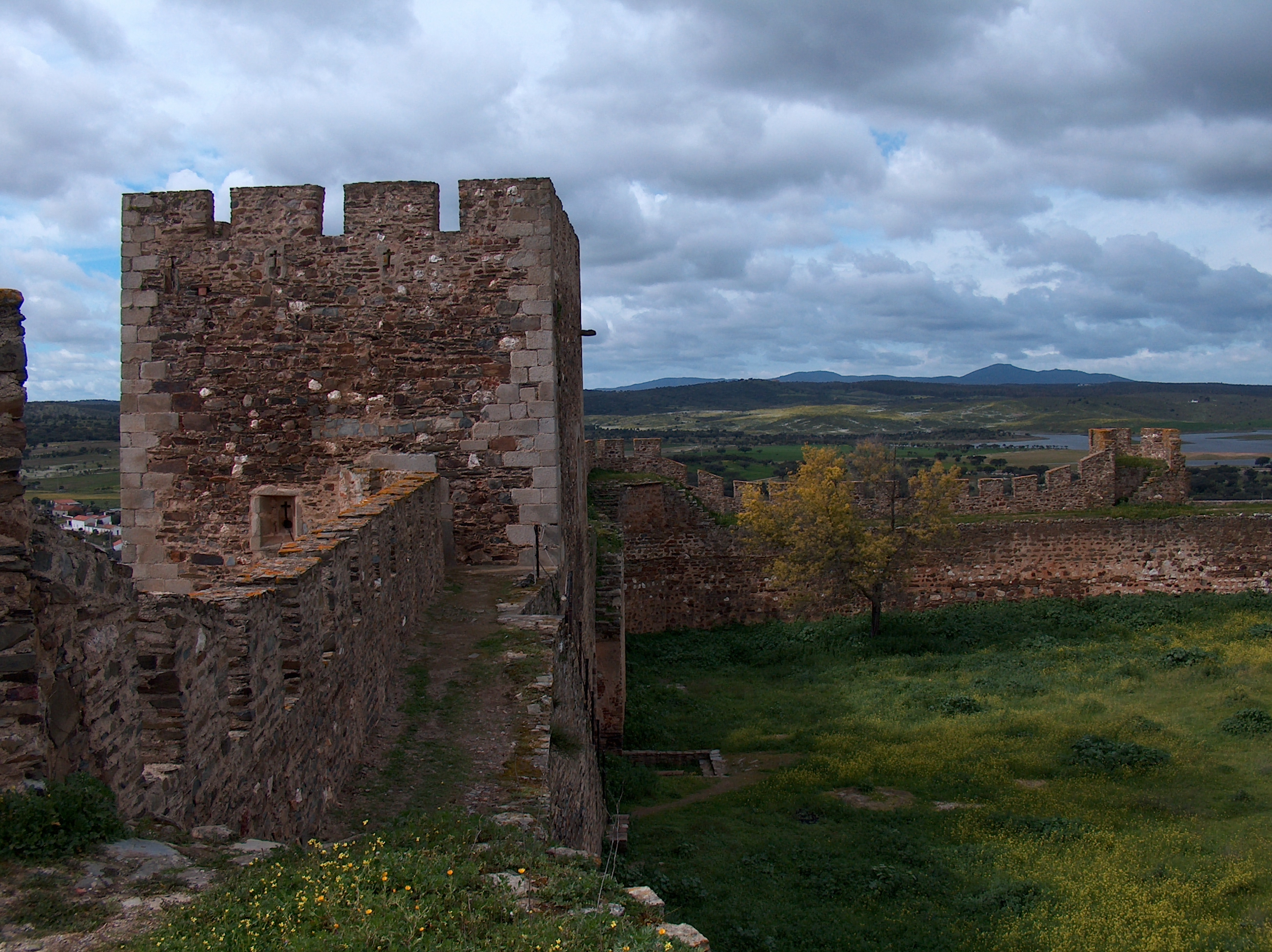 Castelo de Terena